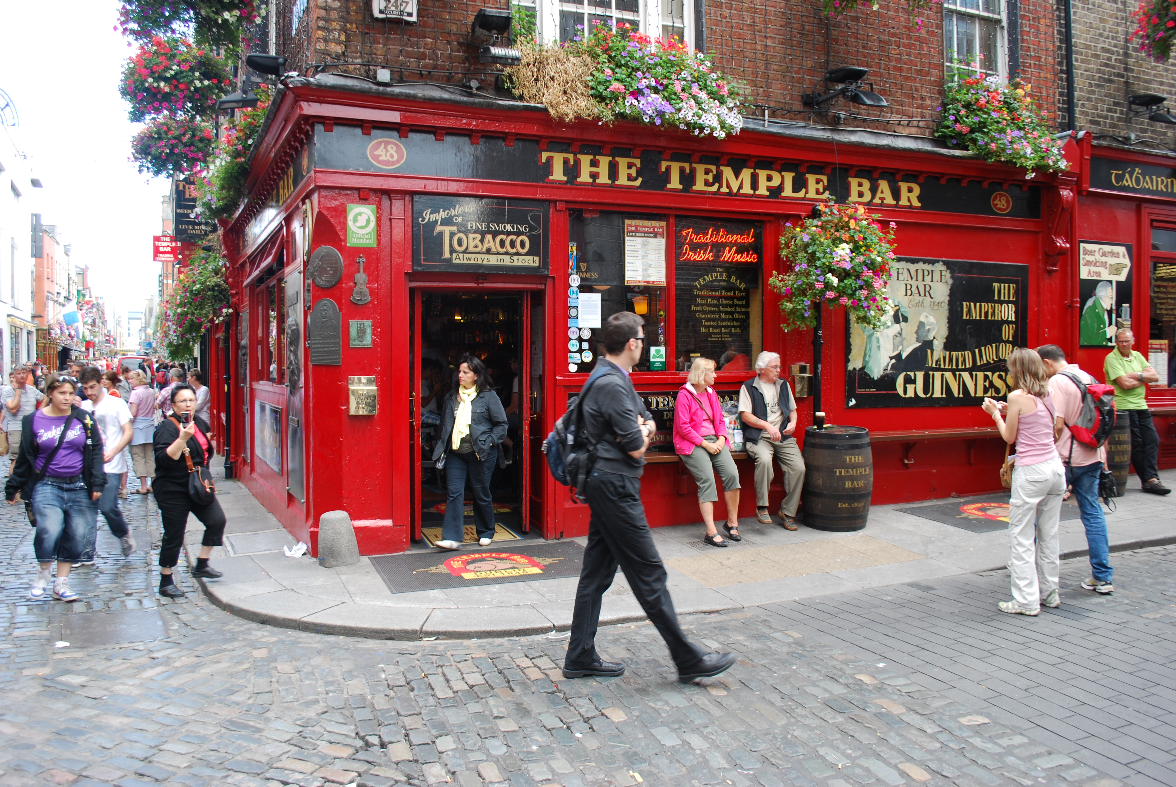 Vue du quartier de Temple Bar à Dublin.